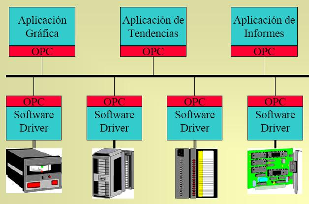 solucion opc